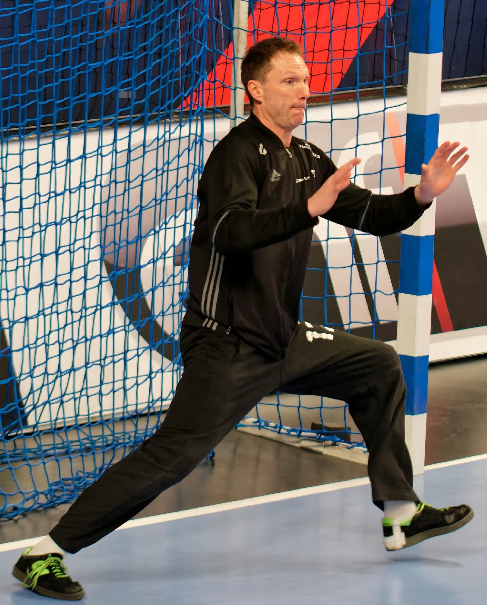 Rencontre de phase de groupe de la ligue des champions 2016-17 entre le PSG et Bjerringbro-Silkeborg. A Coubertin, le 11 février 2017.